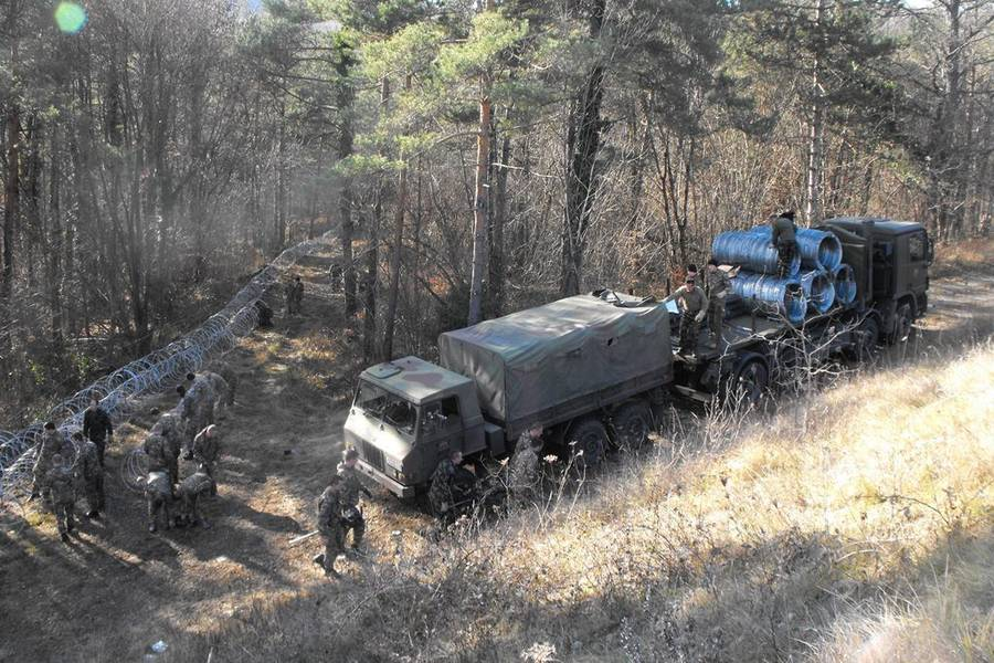 Slovenska vojska podpira oskrbo migrantov tudi v prazničnem času.